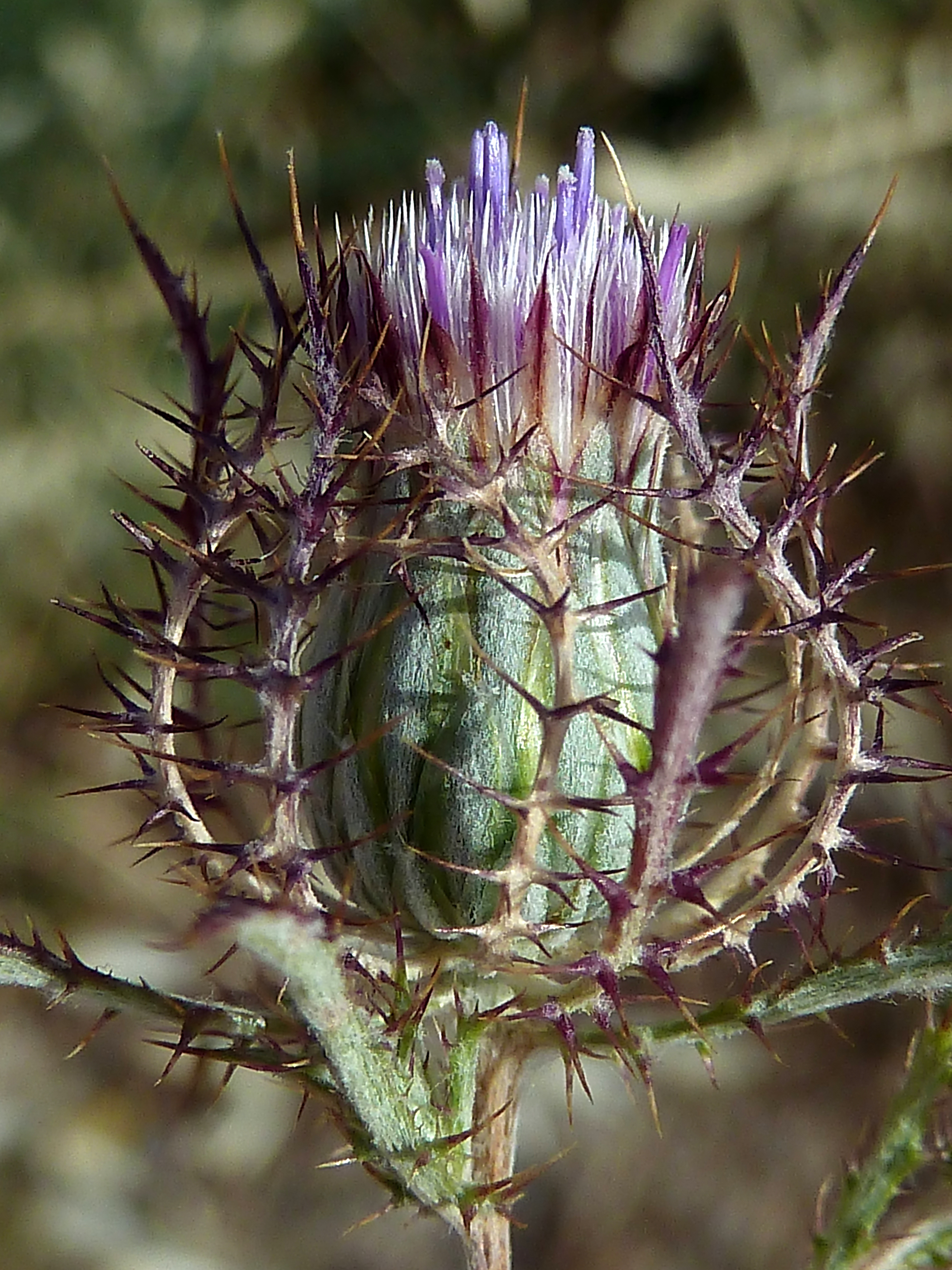 Atractylis cancellata (cancelillos, cardo enrejado,...) - Capítulo en antesis. - circa Villa Suzana, Colonia Illicitana, Albatera (Provincia de Alicante, España).